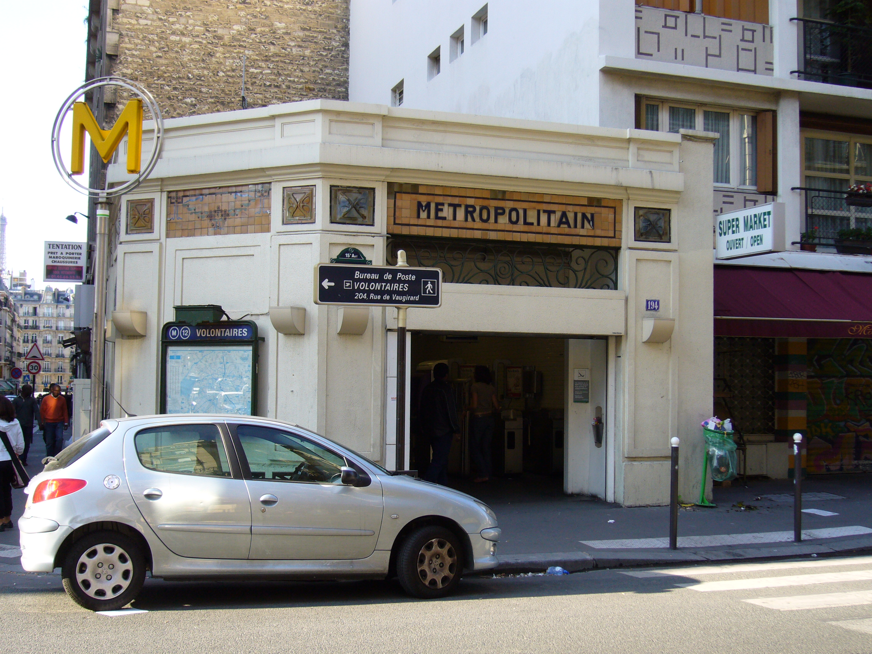 Entrée de la station Volontaires du métro parisien,, no 194 rue de Vaugirard, XVe arrondissement, Paris, France.